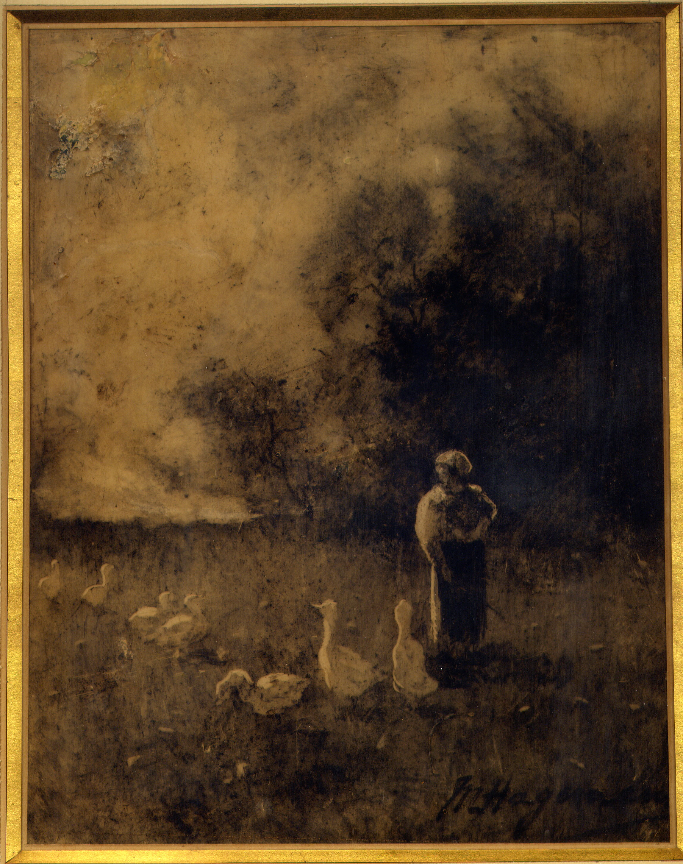 peinture par Maurice Hagemans (Liège 1852-Ixelles 1917), la gardienne d'oies, (cm 19 x 23)